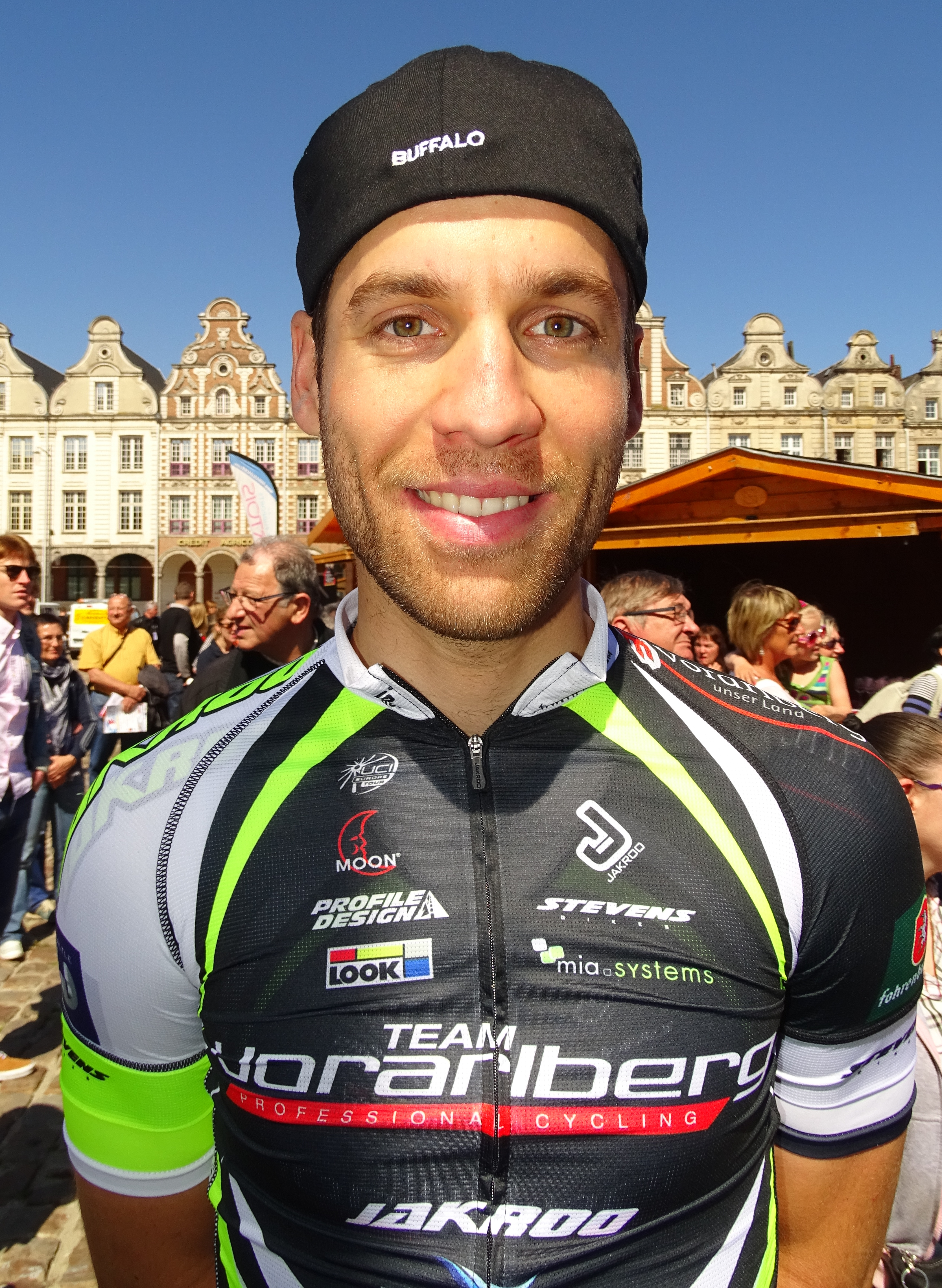 Reportage réalisé le dimanche 24 mai 2015 à l'occasion du départ et de l'arrivée de la troisième étape du Paris-Arras Tour 2015 à Arras, Pas-de-Calais, Nord-Pas-de-Calais, France. Depicted person: Grischa Janorschke Depicted team: Vorarlberg